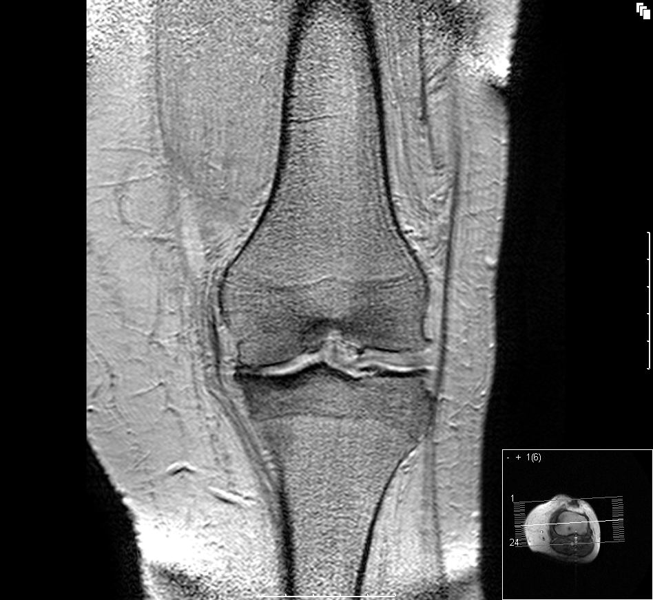 Bildbeschreibung: Gonarthrose, medialer Aufbrauch des Knorpels Quelle: eigene Aufnahme Datum: Autor: User:Scuba-limp